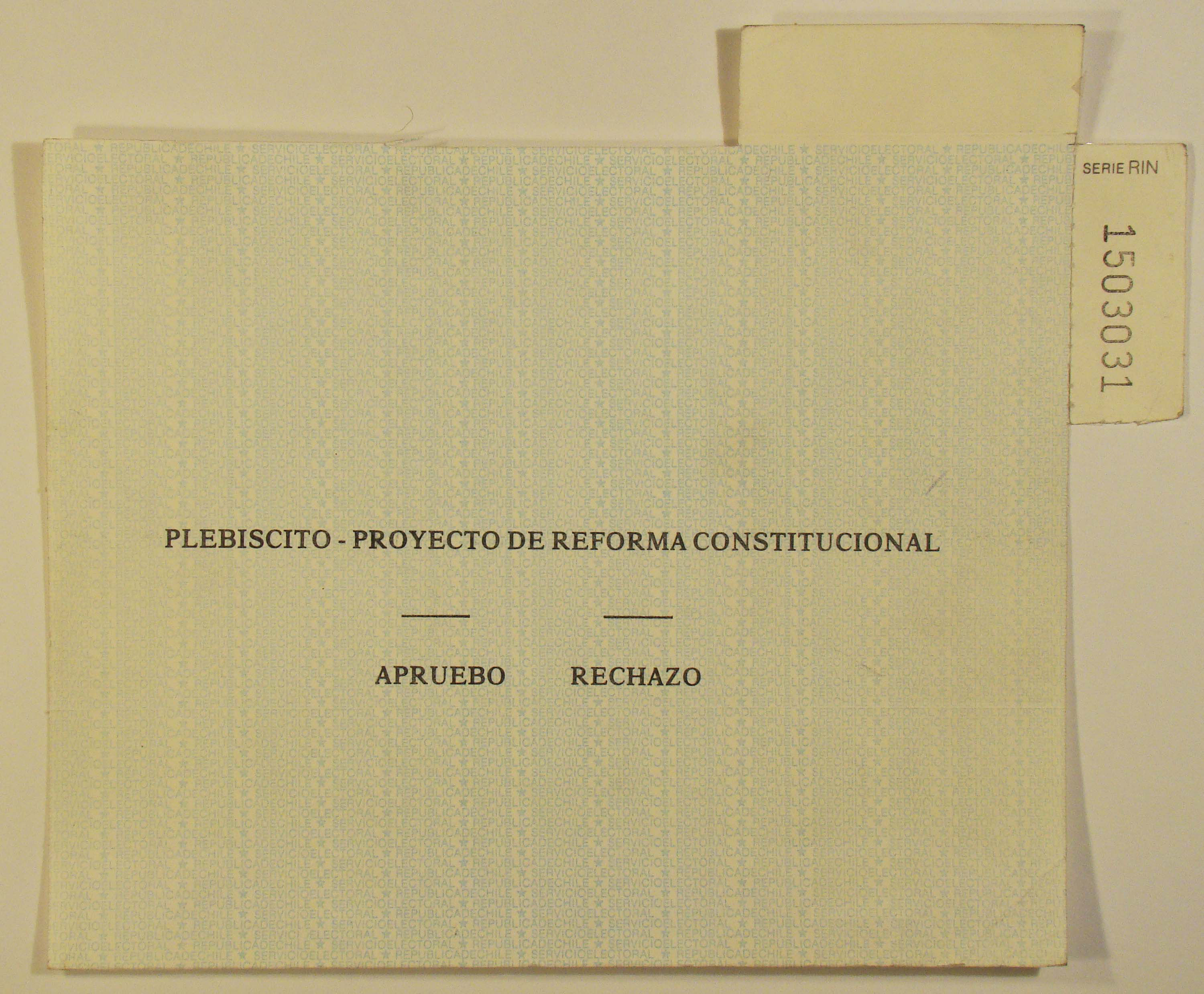 Documento de la época del Regimen militar de Augusto Pinochet en Chile